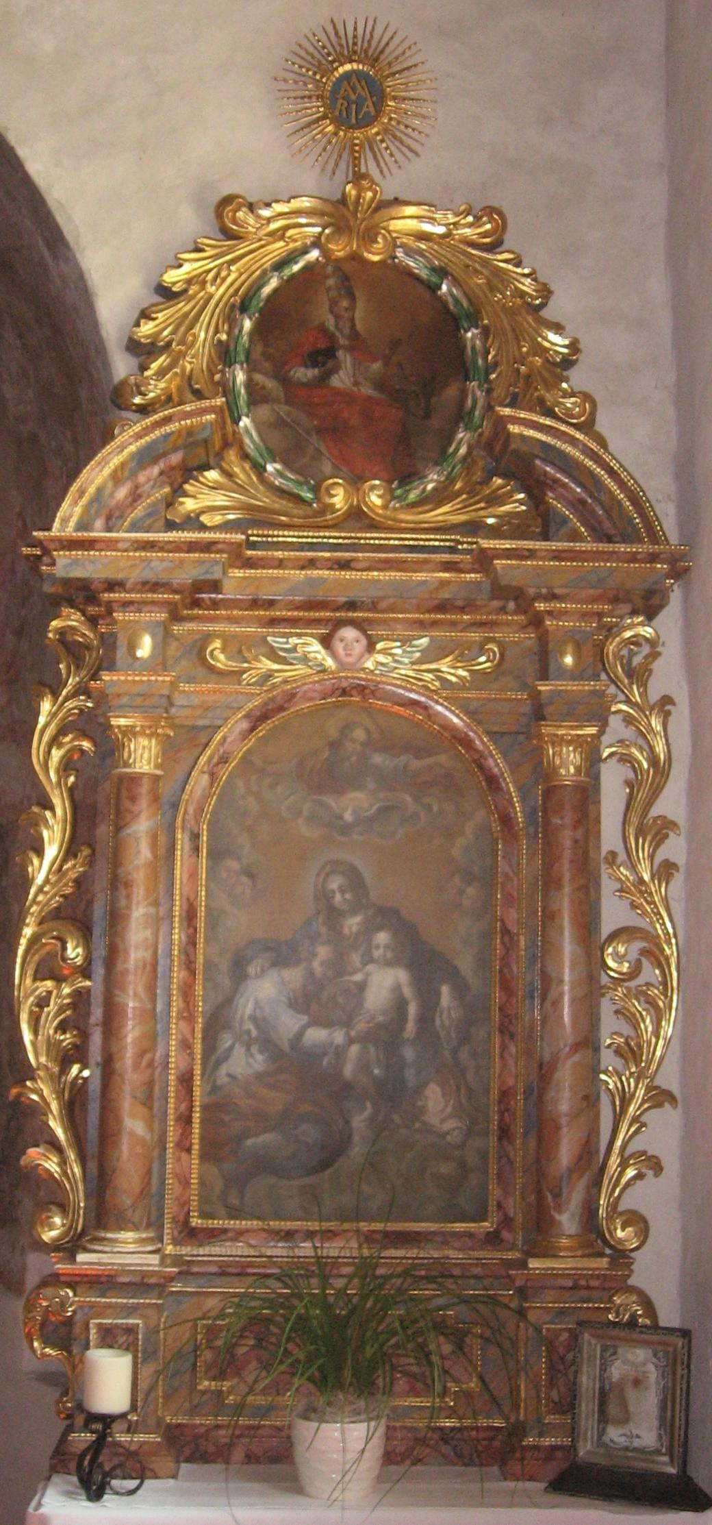 Altar inside Saint George church on Danielsberg, about 1700.